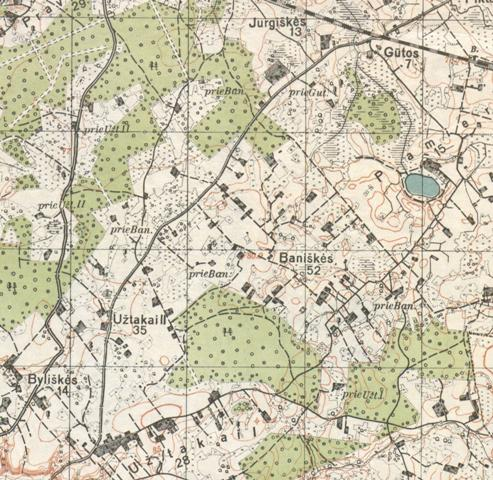 Baniškės ir apylinkės 1931 m. žemėlapyje. Lietuvos nacionalinė Martyno Mažvydo biblioteka. Retų knygų ir rankraščių skyrius.